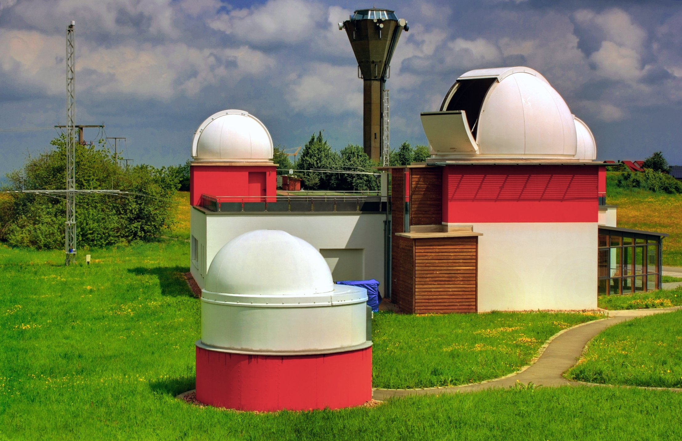 Anblick der Sternwarte aus südlicher Richtung. Im Hintergrund (auf der höchsten Erhebung der Gemeinde) der Wasserturm, dahinter sieht man die ersten Häuser der kleinen Ortschaft Brittheim. Sternwarte Zollern-Alb, Rosenfeld-Brittheim e.V.